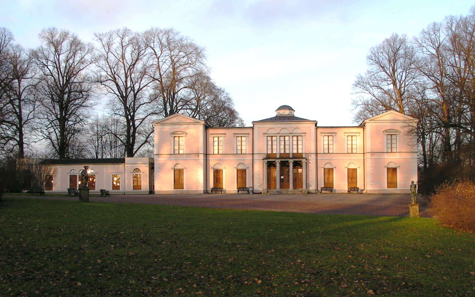 Rosendals slott, Stockholm - OpenStreetMap(Info)